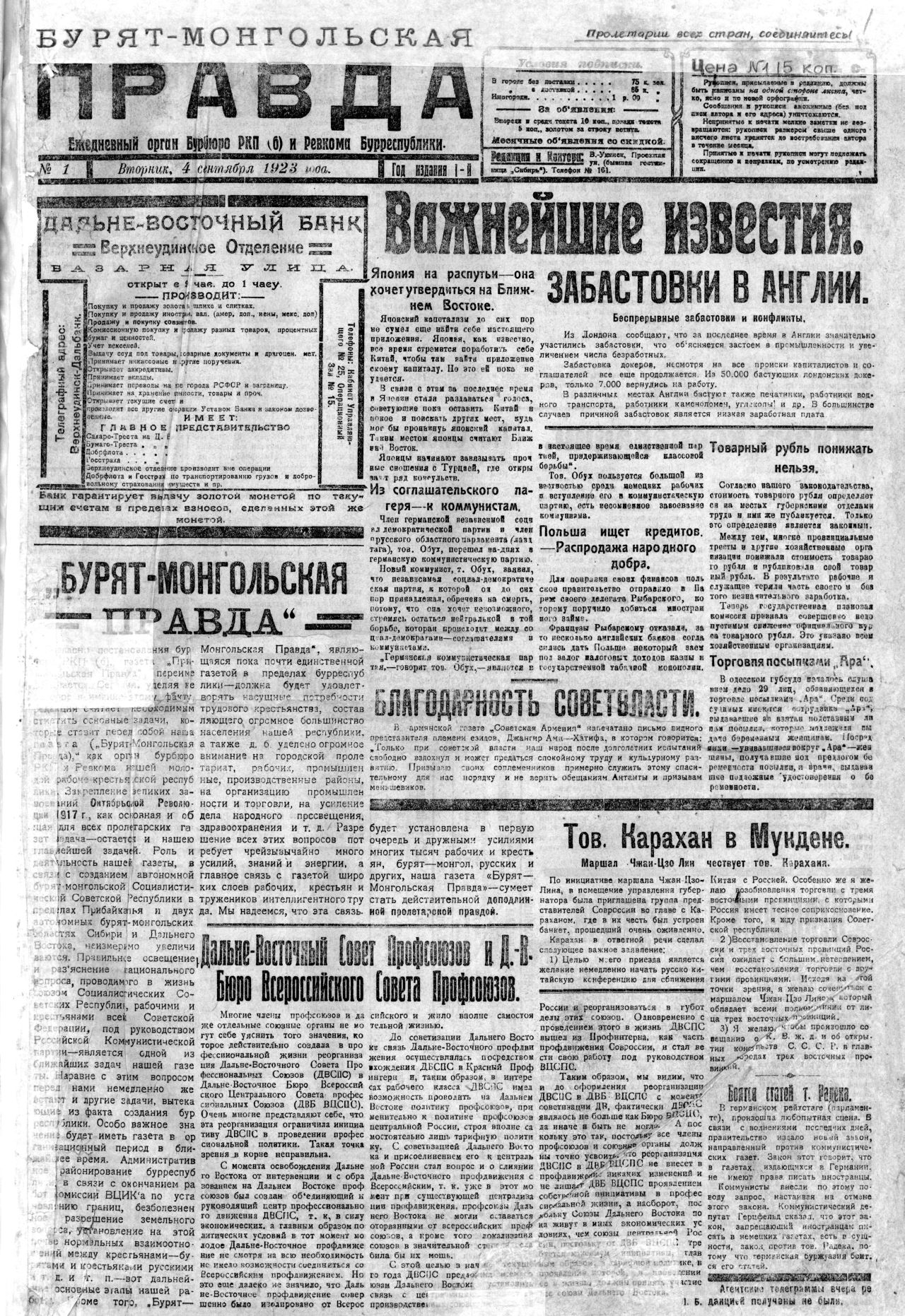 Первая страница газеты "Бурят-Монгольская Правда". г. Верхнеудинск.